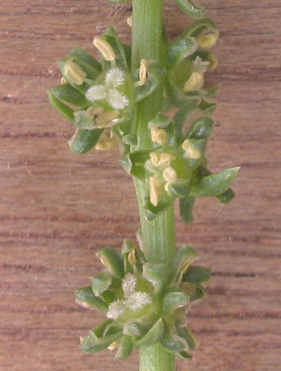 (nl: Suikerbiet bloem) Beta vulgaris flower